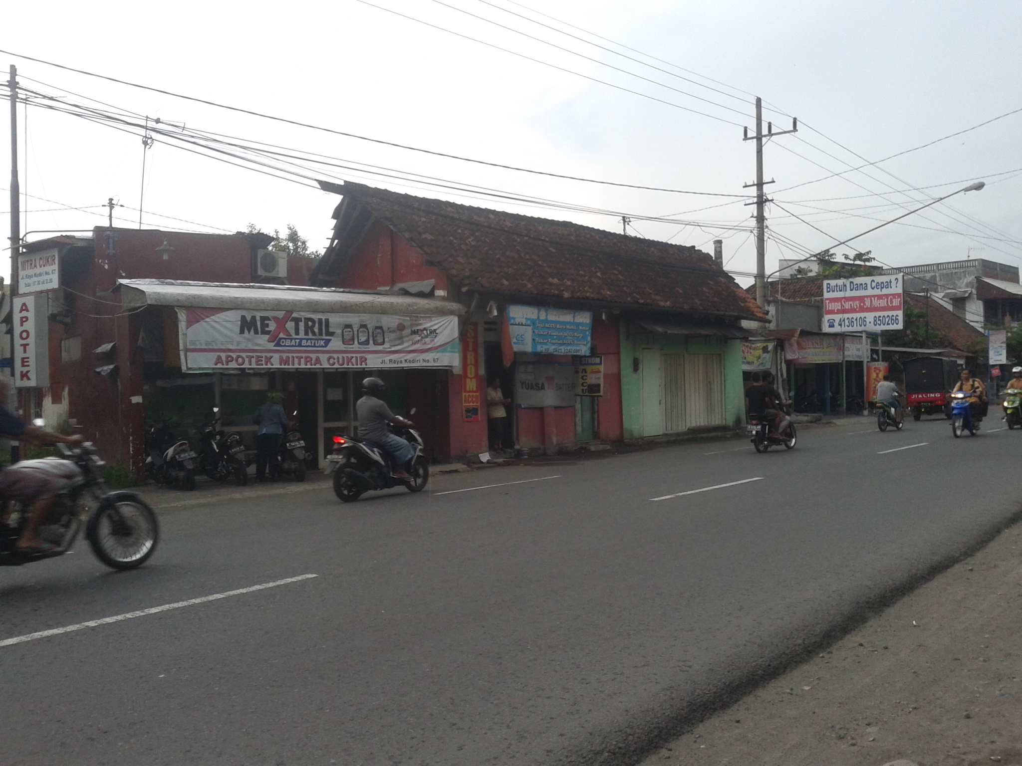 Eks Station Tjoekir